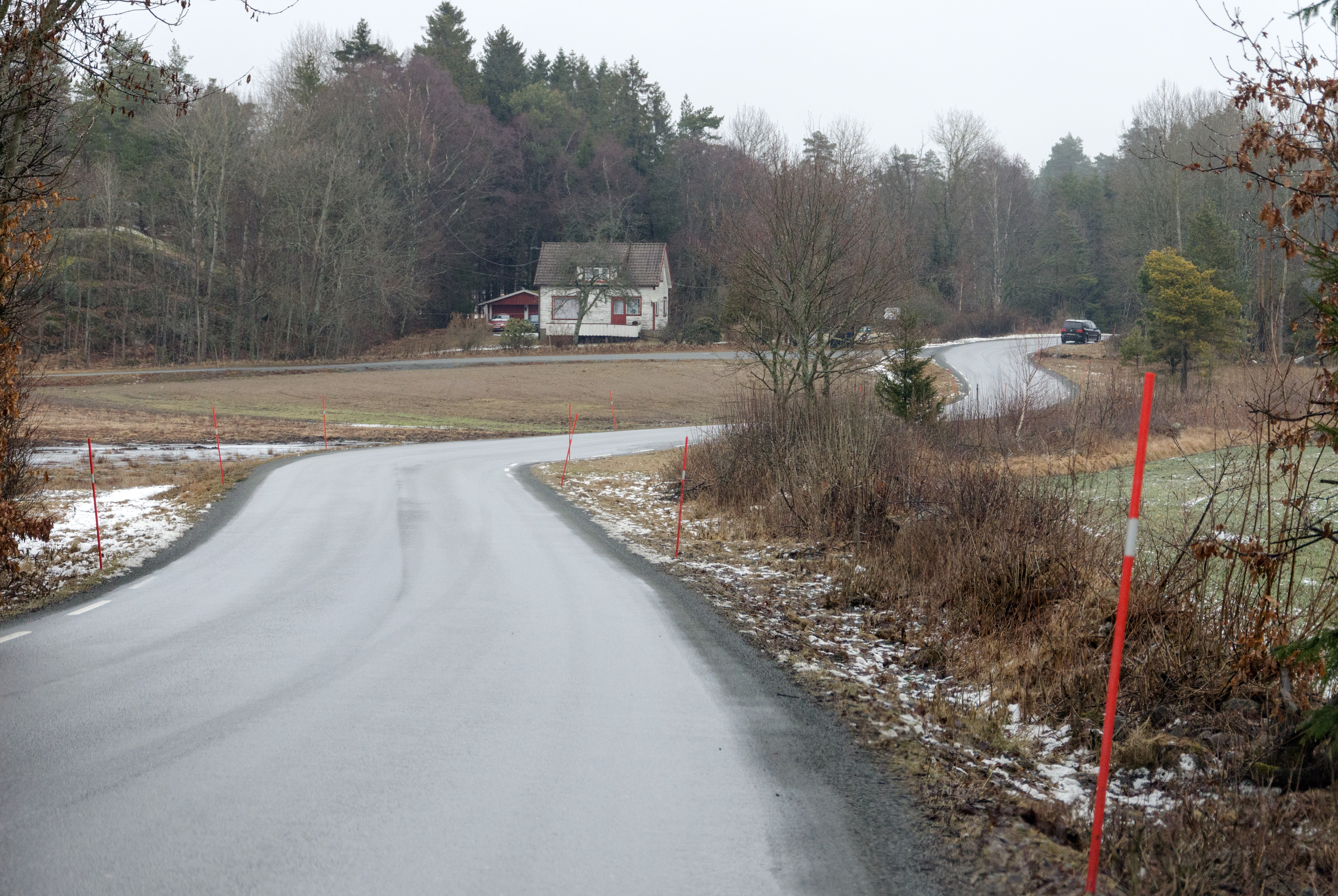 Fylkesvei 58 Foldvikveien i Larvik